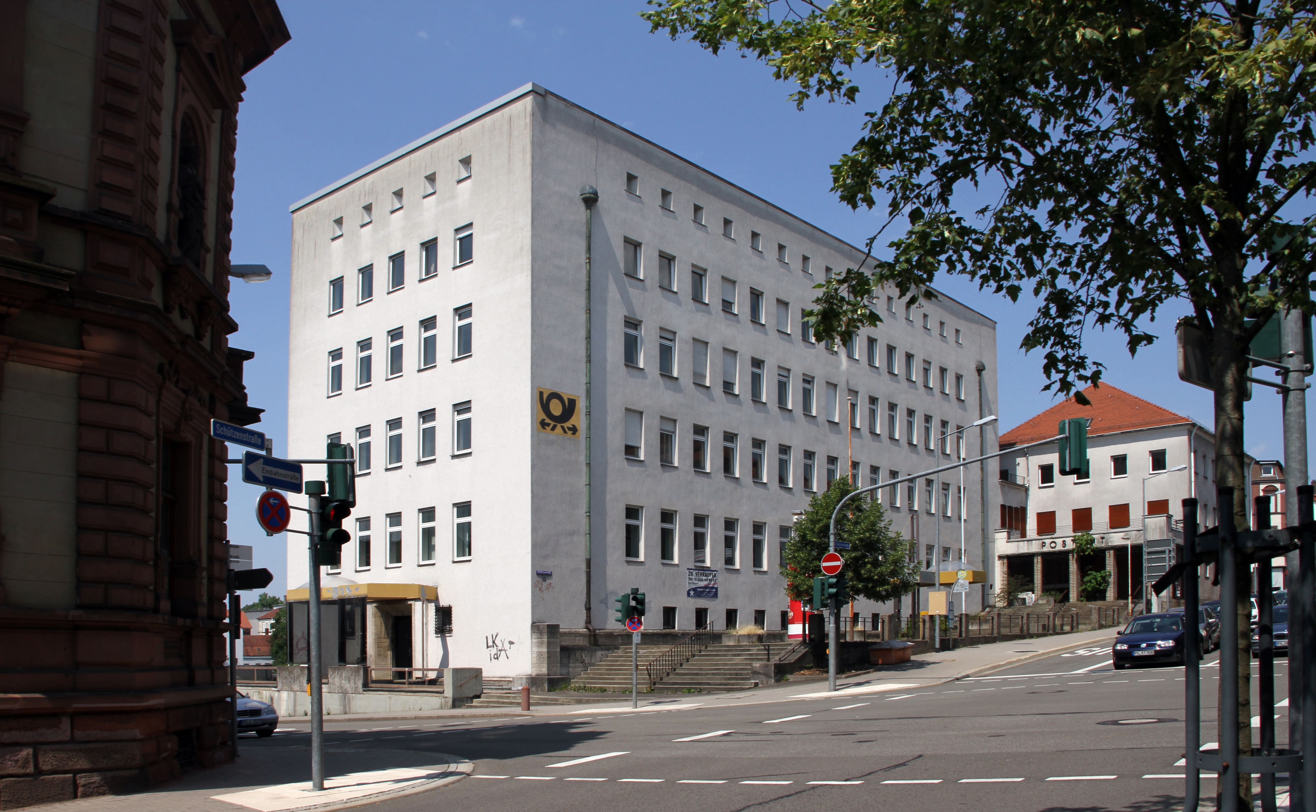 Pirmasens, Schützenstraße 14 Ecke Bahnhofstraße; ehemalige Hauptpost, 1926 ff.; sechsgeschossiger Flachdachbau, niedriger Zwischenbau, dreigeschossiger Walmdachtrakt.